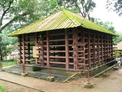 കോന്നി ആനക്കൂട്